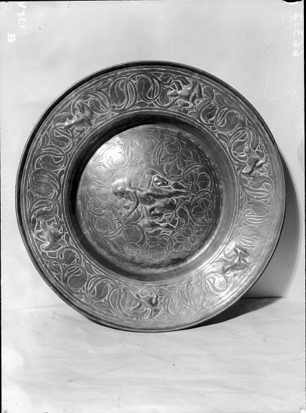 Dopfat av mässing, 1636. Kategori: (04) Dopkärl Dopfat av mässing, 1636.